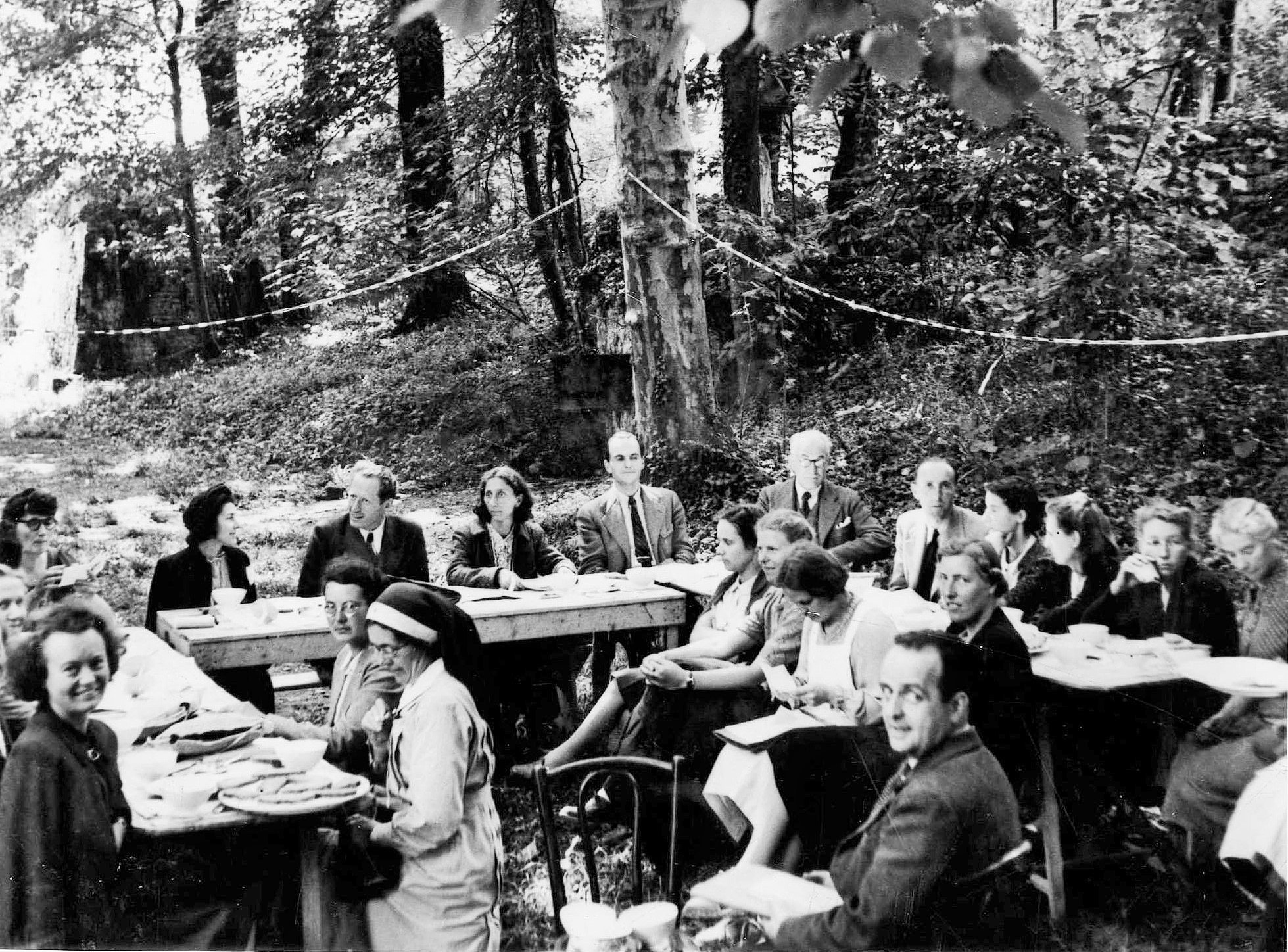 SRK-Mitarbeiter Zusammenkunft in Montluel, Département Ain, Frankreich, Juni 1942. Maurice und Ellenor Dubois, Leiter der Delegation der Südzone in Frankreich (Tisch im Hintergrund, 2. und 3. von links), SRK-Mitarbeiter Treffen in Montluel, Juni 1942